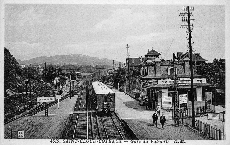 Intérieur de la gare du Val d'Or avec l'embranchement vers les ateliers de Rueil.